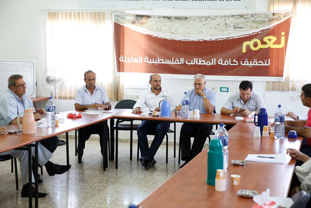 ישיבת ועדת המעקב העליונה של הציבור הערבי עם ח"כ איימן עודה